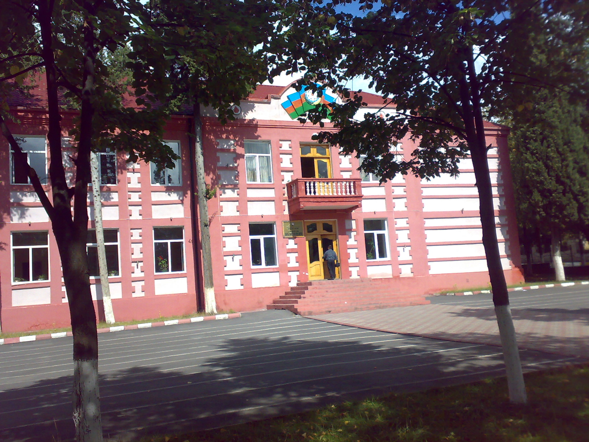 Zaqatala Mekteb - Zagatala School Vor Naxarnaufdanichi